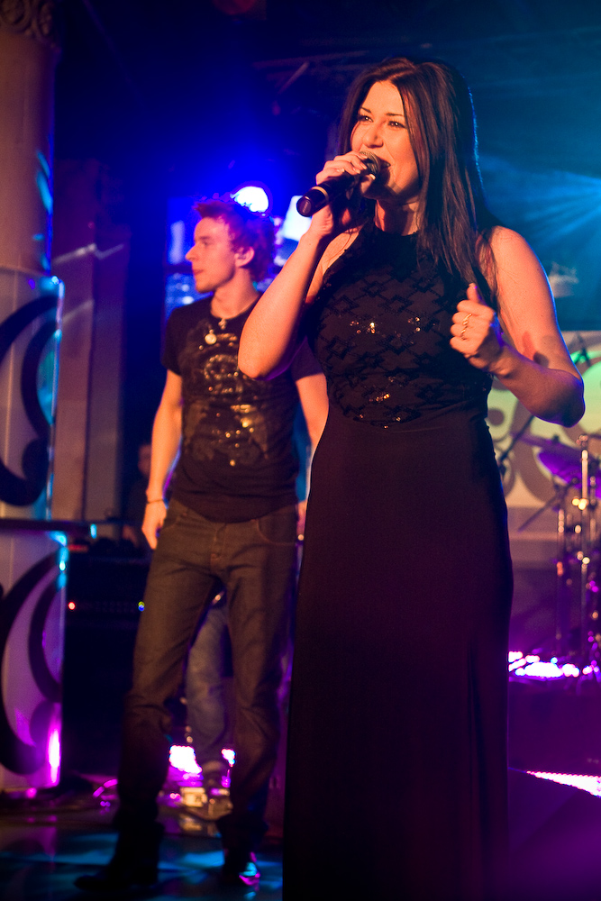 Iwona Wegrowska and Piotr Kupicha